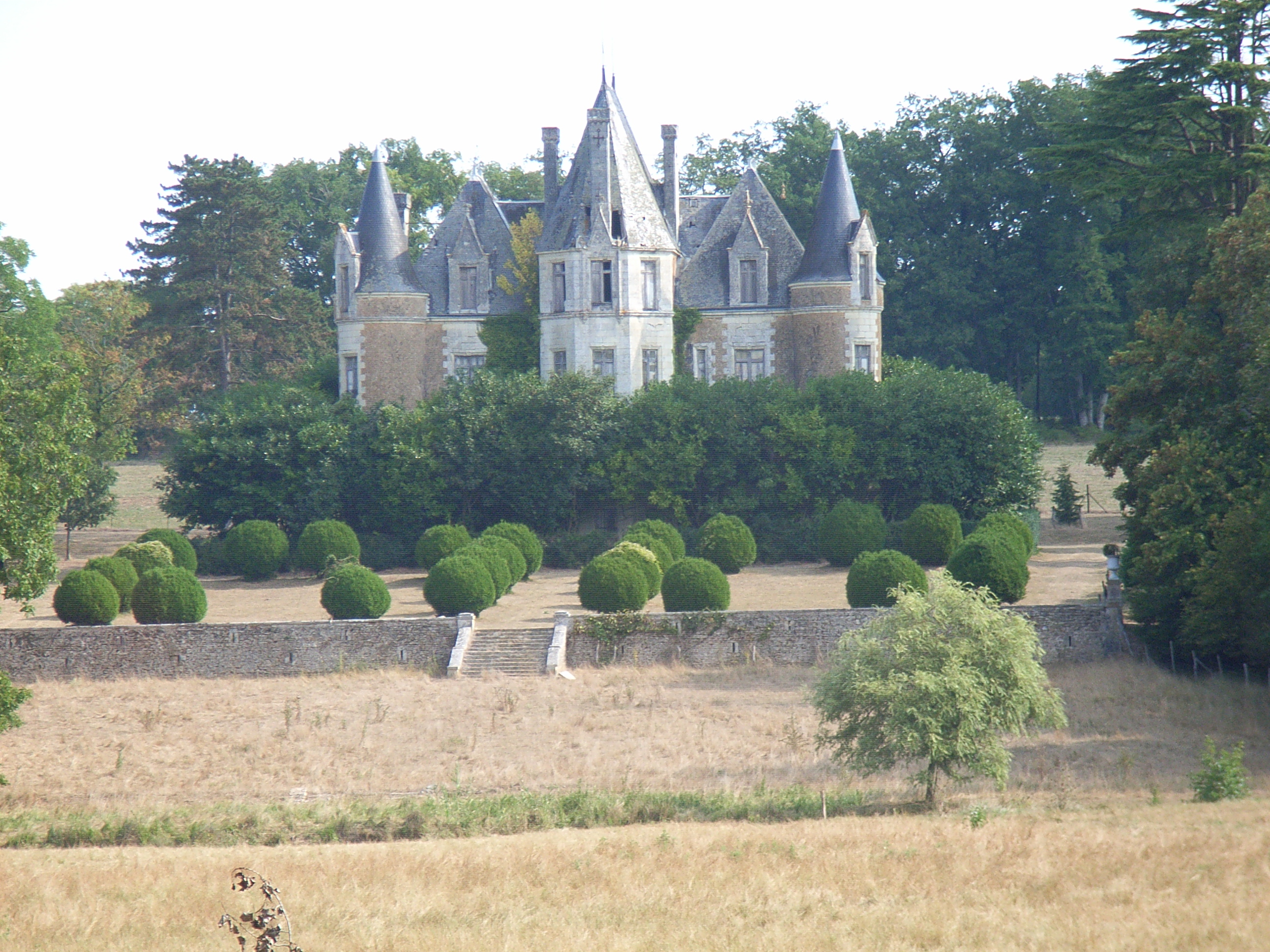 Château du Gué, propriété de Bejarry à Marnay (Vienne)